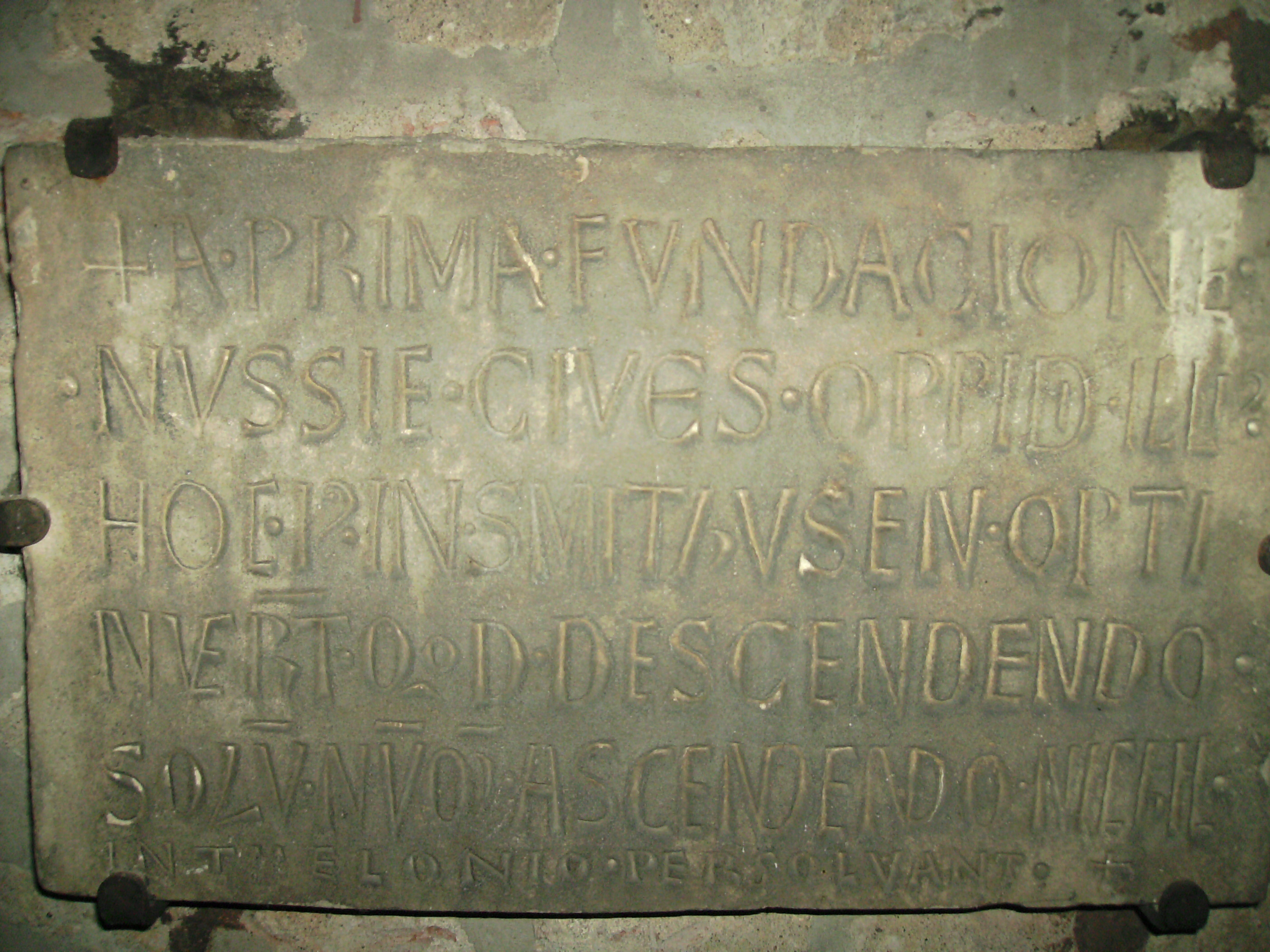 Neusser Zollprivileg (12. Jh.)ursprünglich in Schmithausen angebracht, heute Alte Kirche Kellen